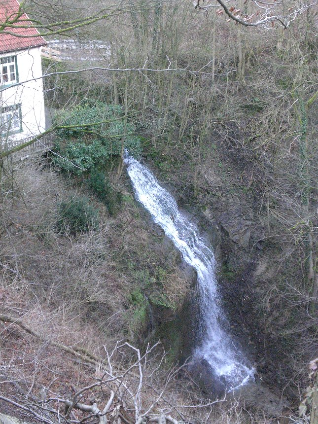 Langenfelder Wasserfall in Hessisch Oldendorf (Landkreis Hameln-Pyrmont), mit 15 m Höhe der höchste natürliche Wasserfall Niedersachsens